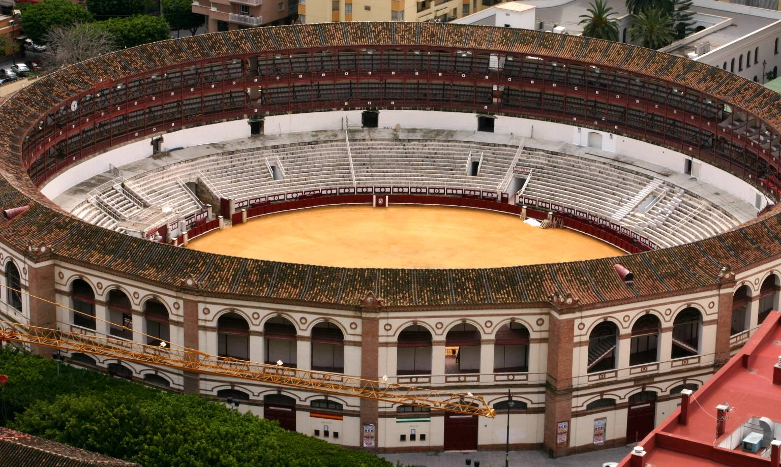 Plaza de Toros de La Madaleta, Málaga.